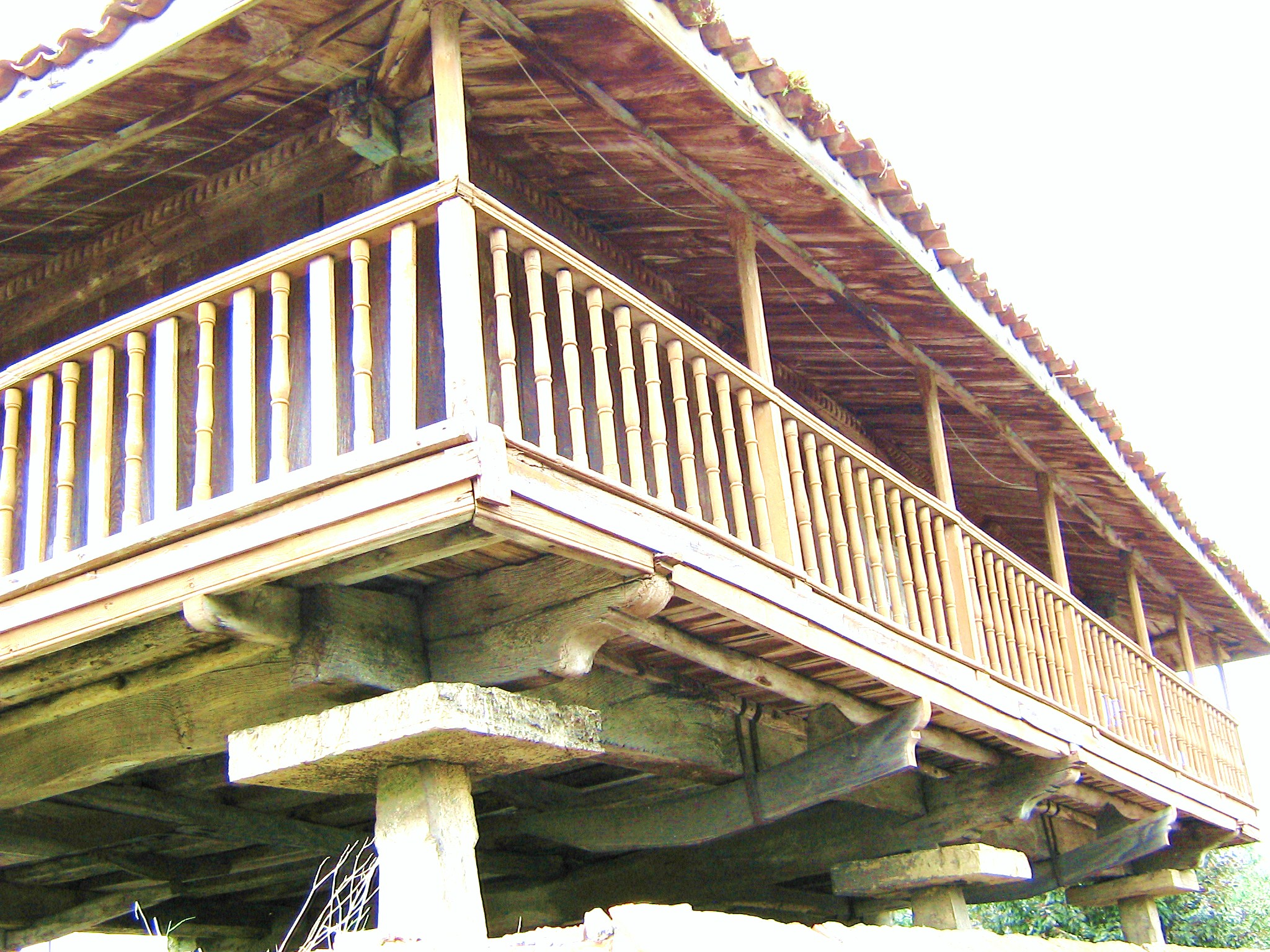 Hórreo cercano a Avilés